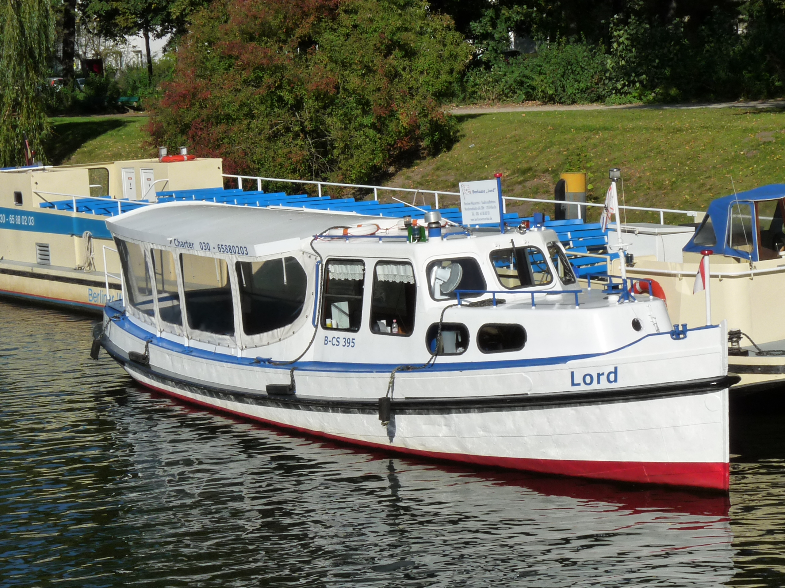 Charterboot Lord, Baujahr 1955, 25 Paxe, 14,13 m / 3,20 m, ex Jan Ostermann in Berlin auf der Spree.